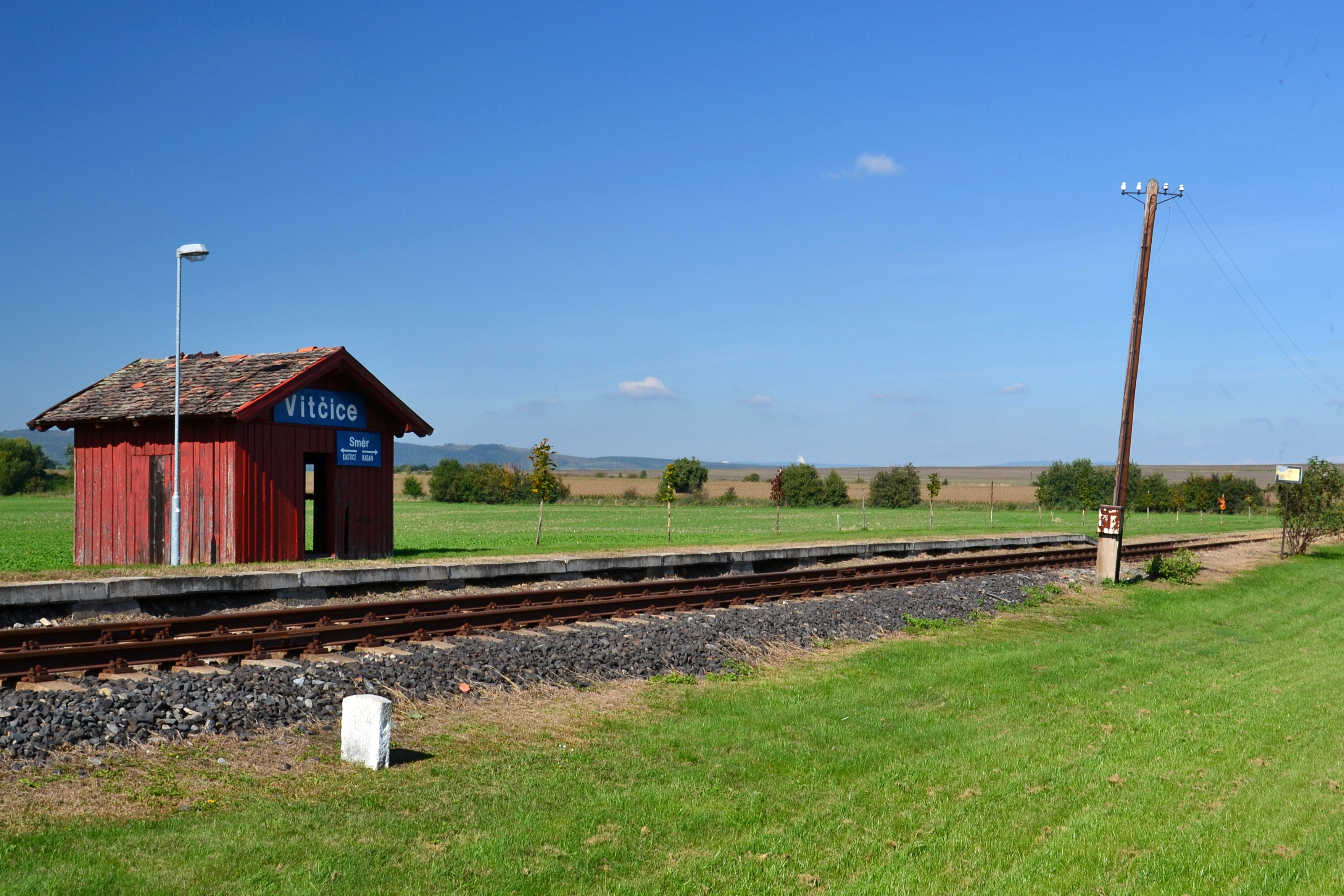 Vitčice – železniční zastávka